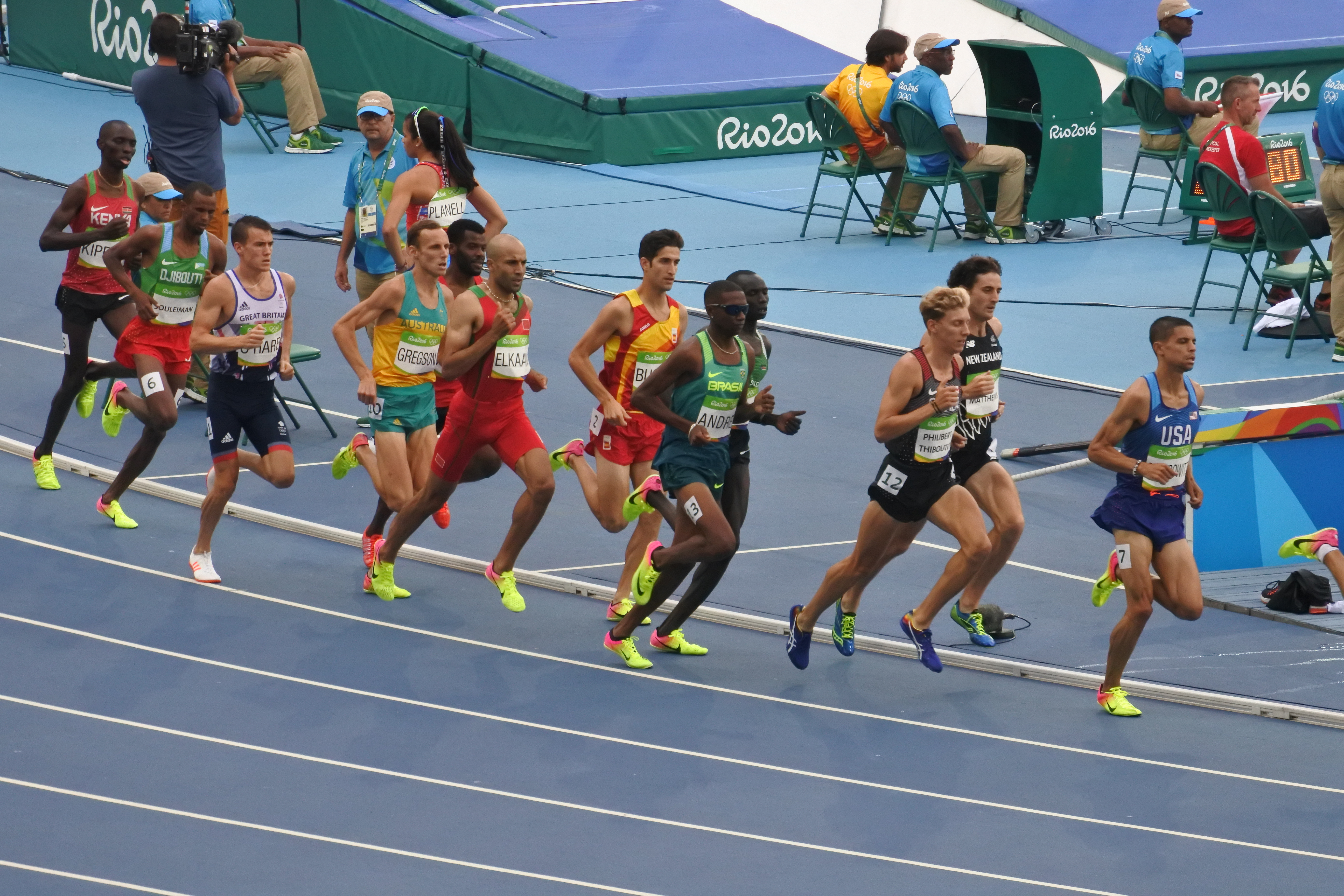 Rio 2016 - Eliminatórias 1500m Masculino